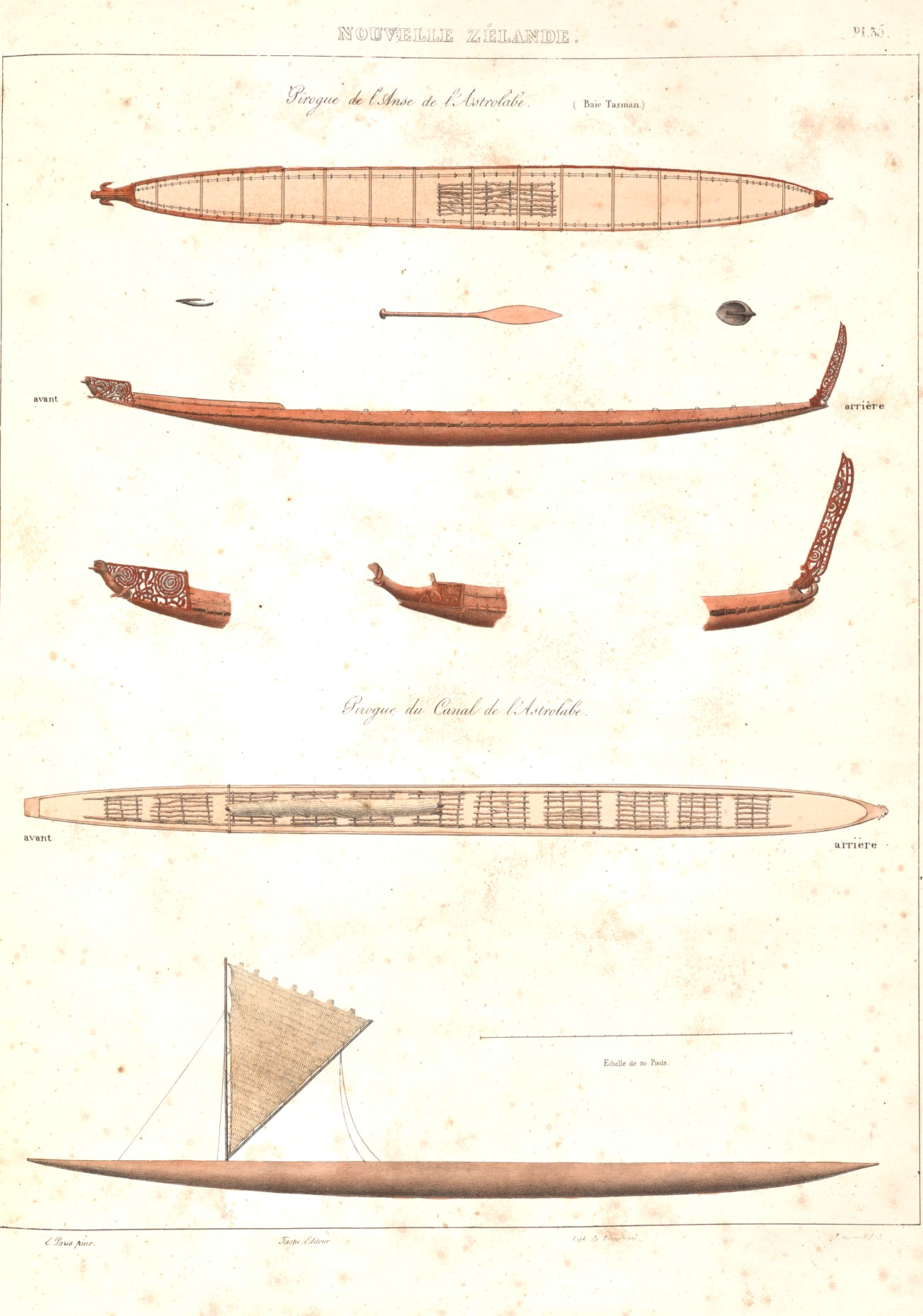 Pirogue du canal de l'Astrolabe, Baie de Tasman, par François-Edmond Pâris (expédition d'Urville 1827-1829) ː style zélandais, sans balancier.